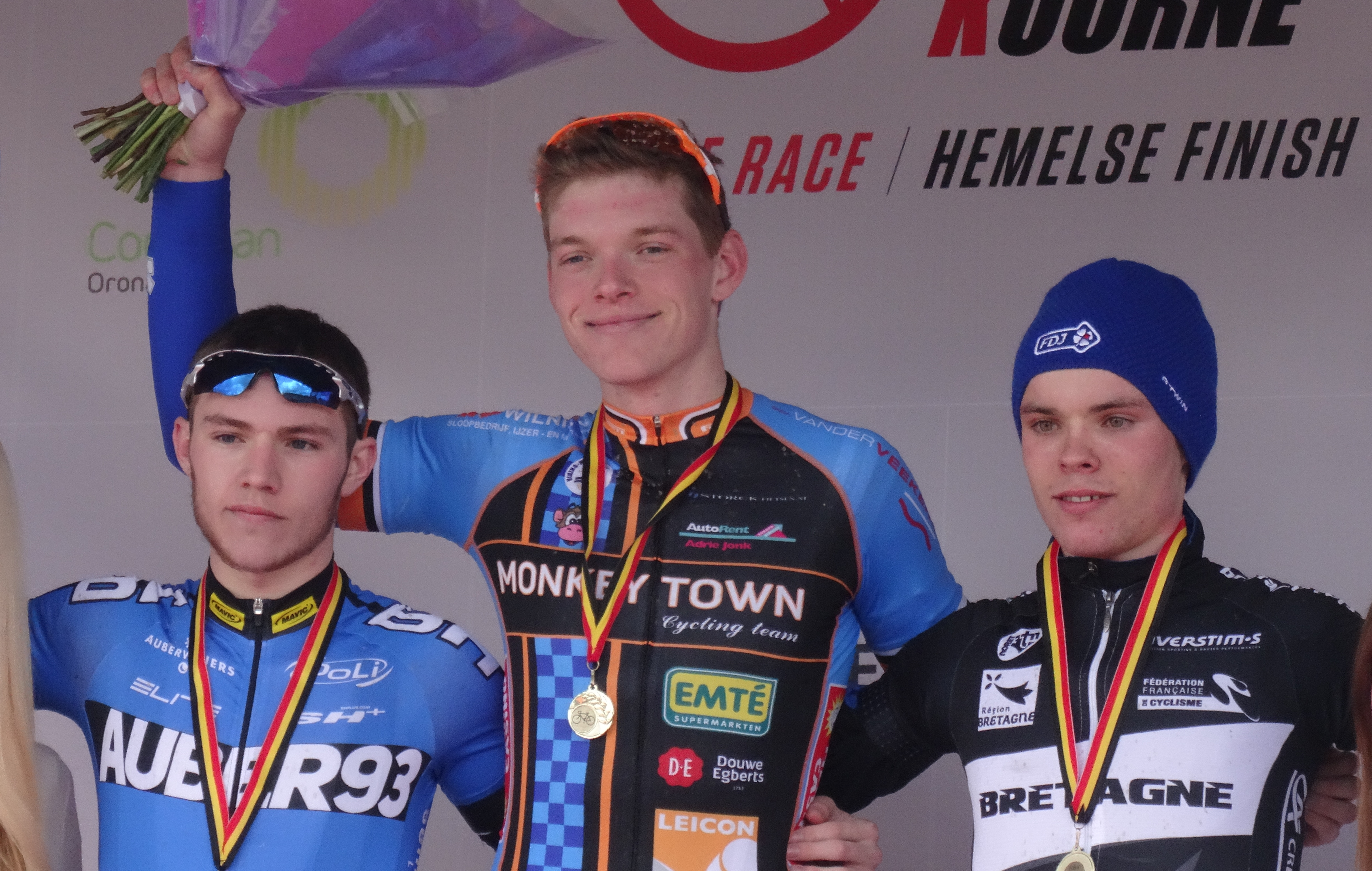 Reportage réalisé le dimanche 1er mars à l'occasion du départ et de l'arrivée de Kuurne-Bruxelles-Kuurne 2015 à Kuurne, Belgique.